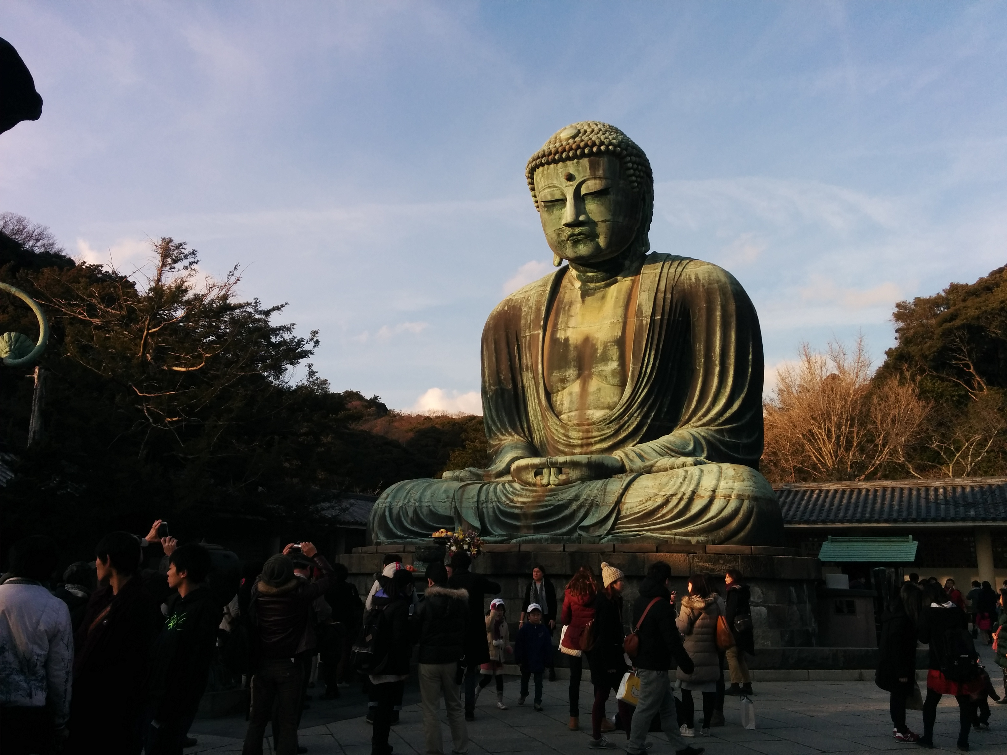 鎌倉大仏 (阿弥陀如来坐像)